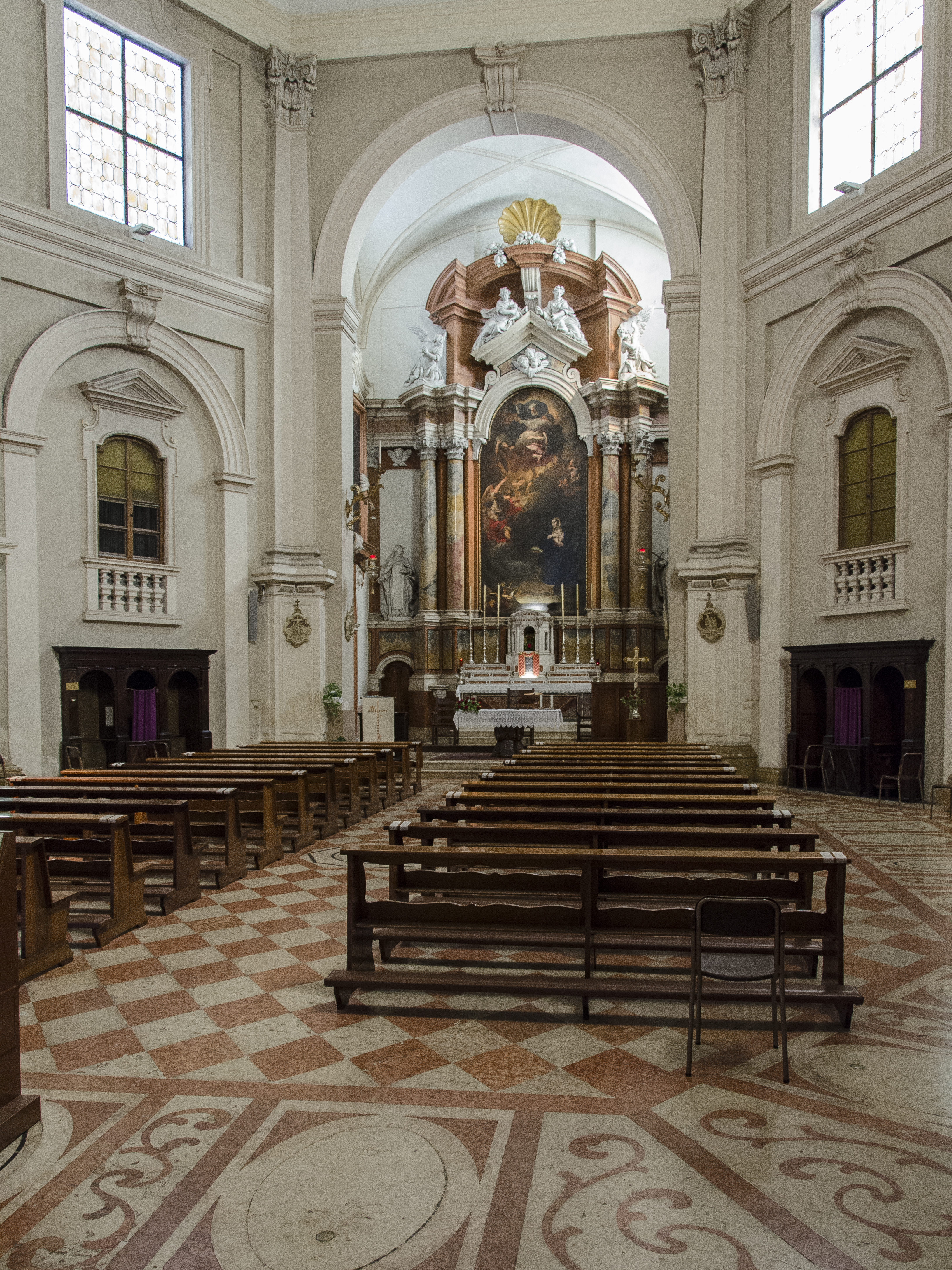 Chiesa degli Scalzi a Verona, interno